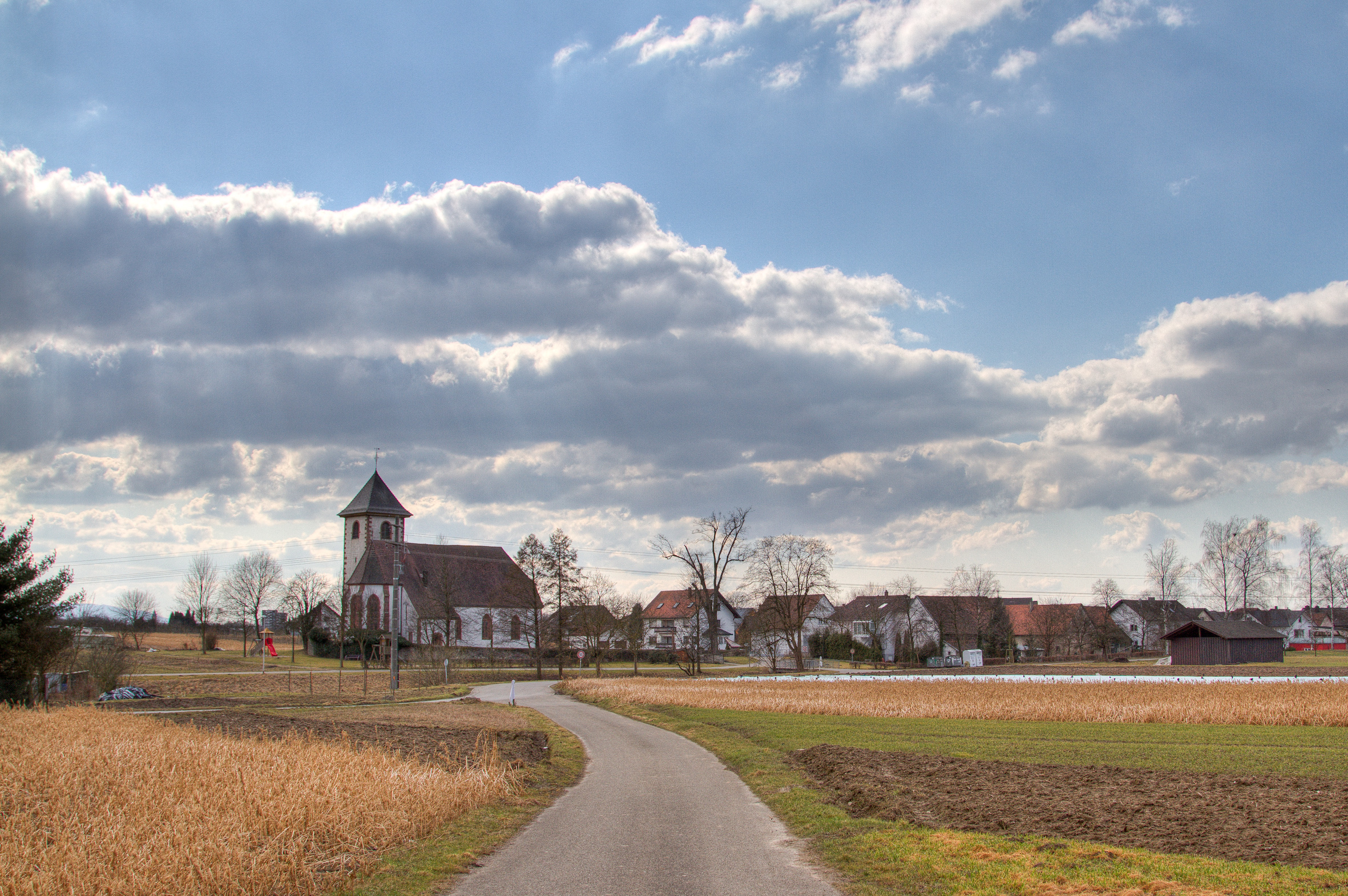 der Weiler Zimmern der Gemeinde Appenweier mit Kirche